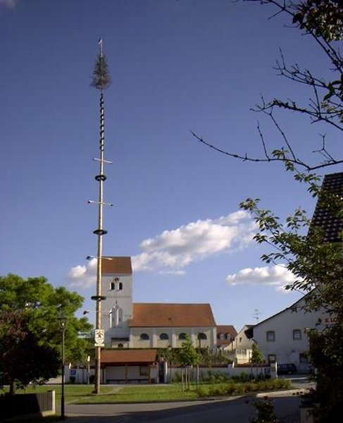 Der Maibaum in Haunersdorf 2001